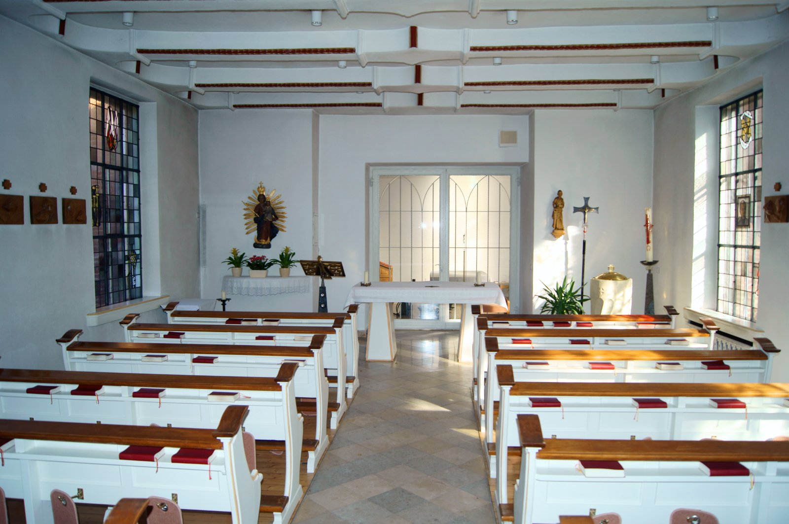 Die Beichtkapelle der Klosterkirche St. Marien Burlo, Stadt Borken, NRW. Der Durchbruch zur Kirche wurde nachträglich geschaffen, um den Besuchern eine bessere Teilnahme am Gottesdienst zu ermöglichen. Zuvor war die Beichtkapelle über einen schmalen Treppenaufgang von der Kirche erreichbar. This is a photograph of an architectural monument. A1 - A 26